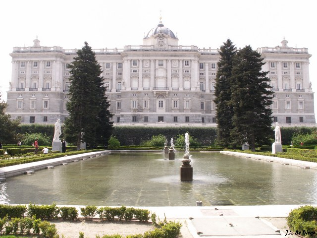 Jardines de Sabatini. En el ángulo norte del Palacio Real, delimitados por la c/ Bailén y la Cuesta de San Vicente. Palacio Real al fondo. Ocupan el espacio que fueron caballerizas del palacio. Recibió su nombre en el s. XIX, no porque los diseñara Sabatini uno de los constructores del palacio.